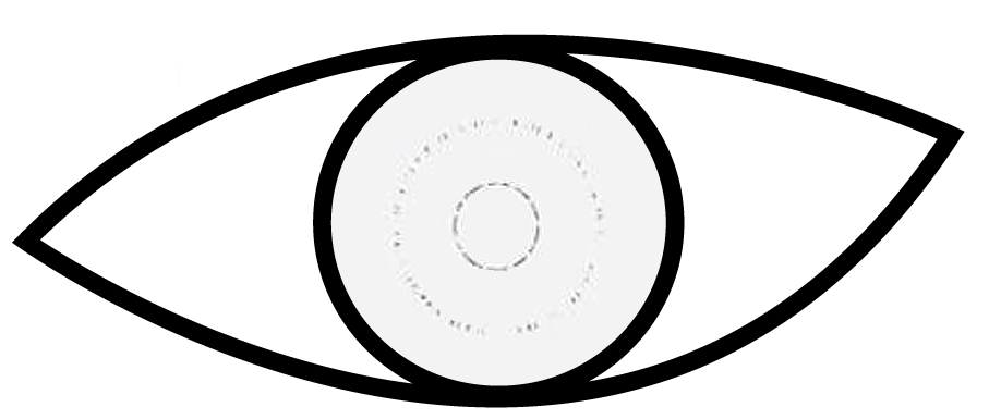 Muestra el Byakugan de la serie Naruto